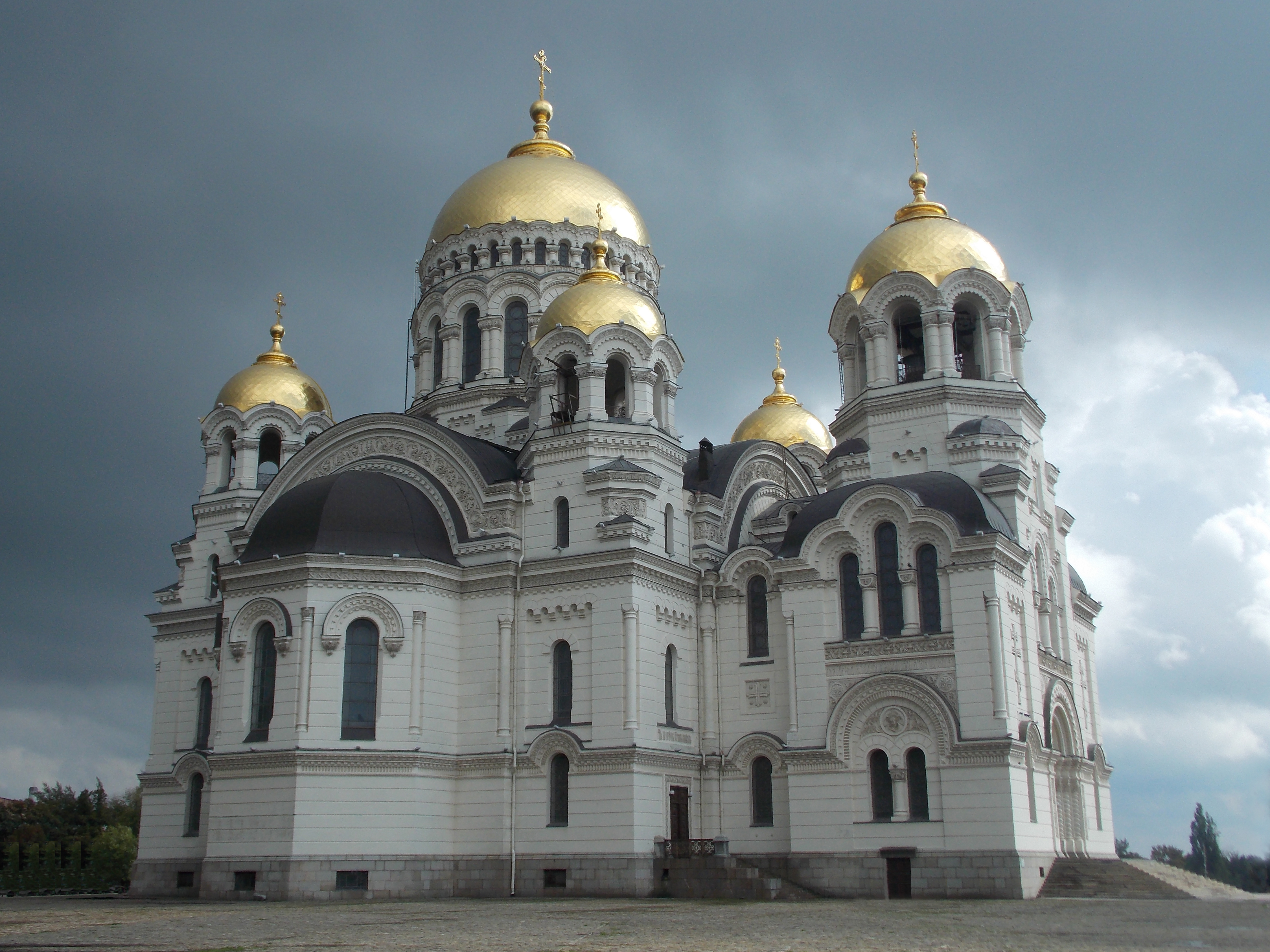 Войсковой Вознесенский собор - усыпальница Героев Отечественной войны 1812 года: площадь Ермака, 1, Новочеркасск, Ростовская область